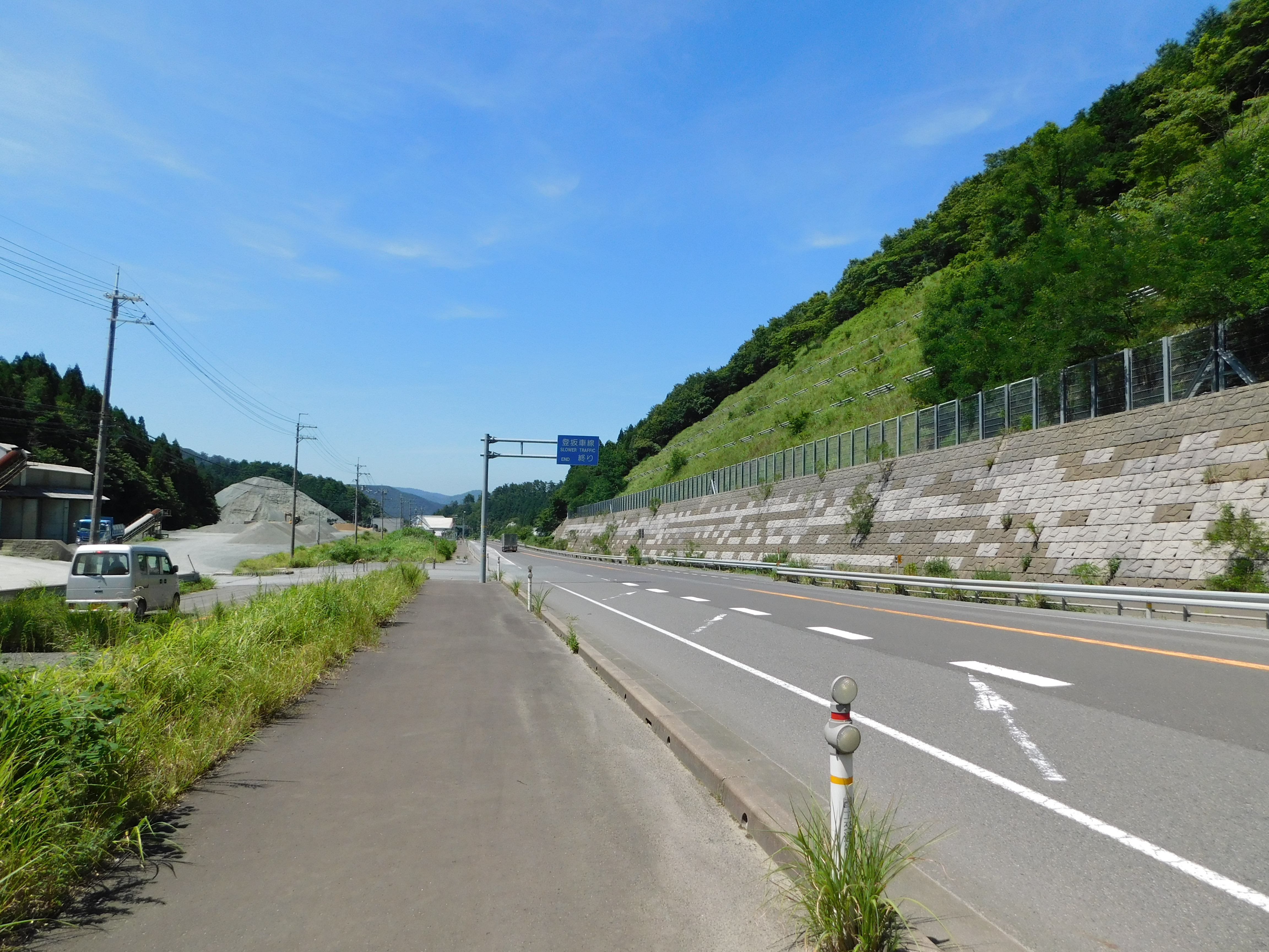 福井県若狭町の倉見峠、西側からの登り、登坂車線の終点。